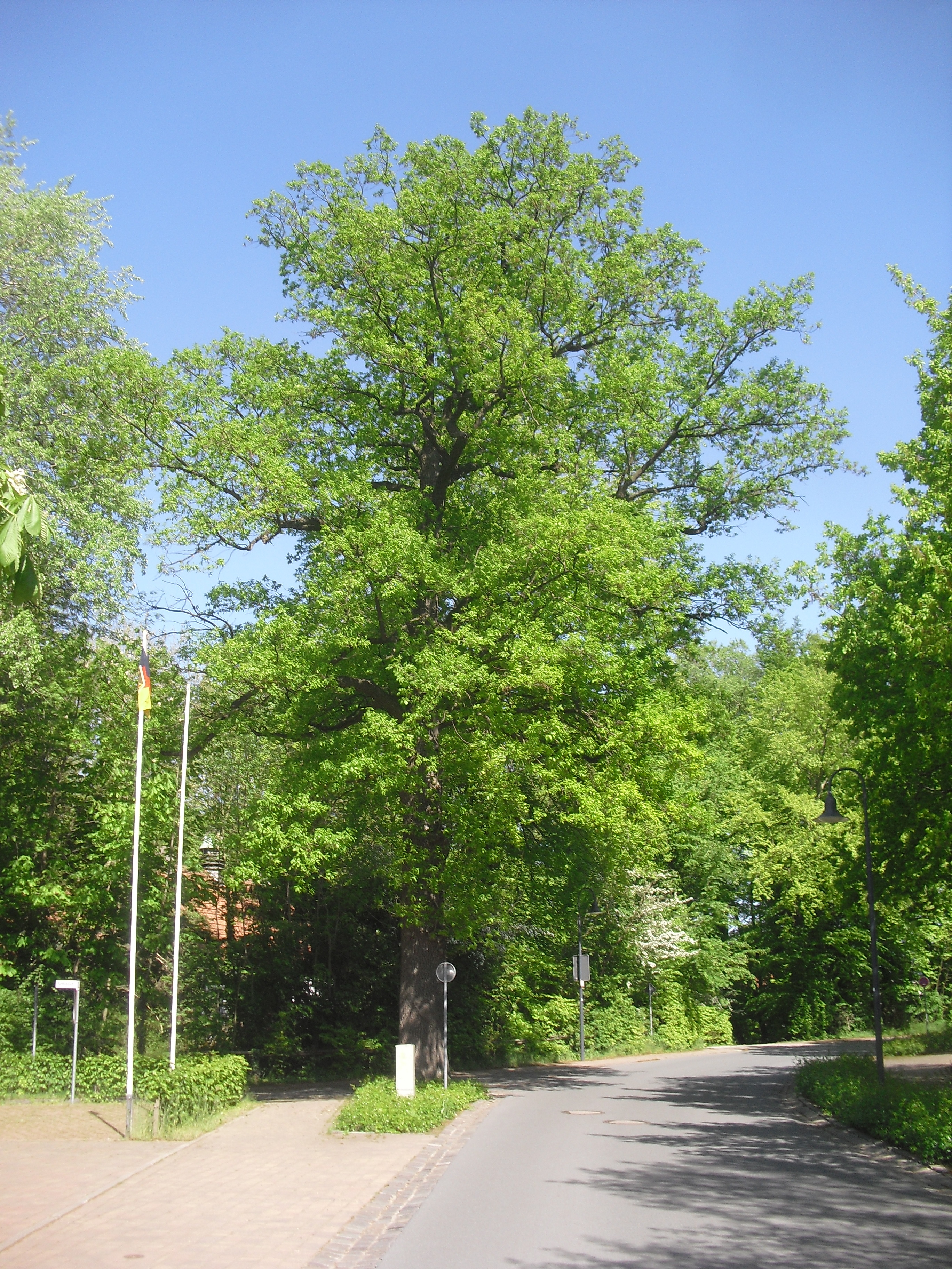 Eiche an der Westernstraße in Thüle (Naturdenkmal Nr. SK 12 I)